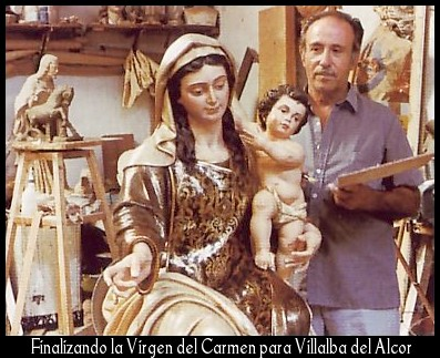 Joaquín Moreno Daza trabajando en la Virgen del Carmen